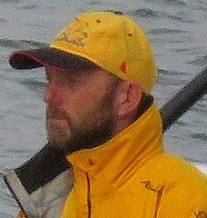 Abu Dhabi, steady... Marca assim... #ador #vor #itajaistopover #volvooceanrace #sail